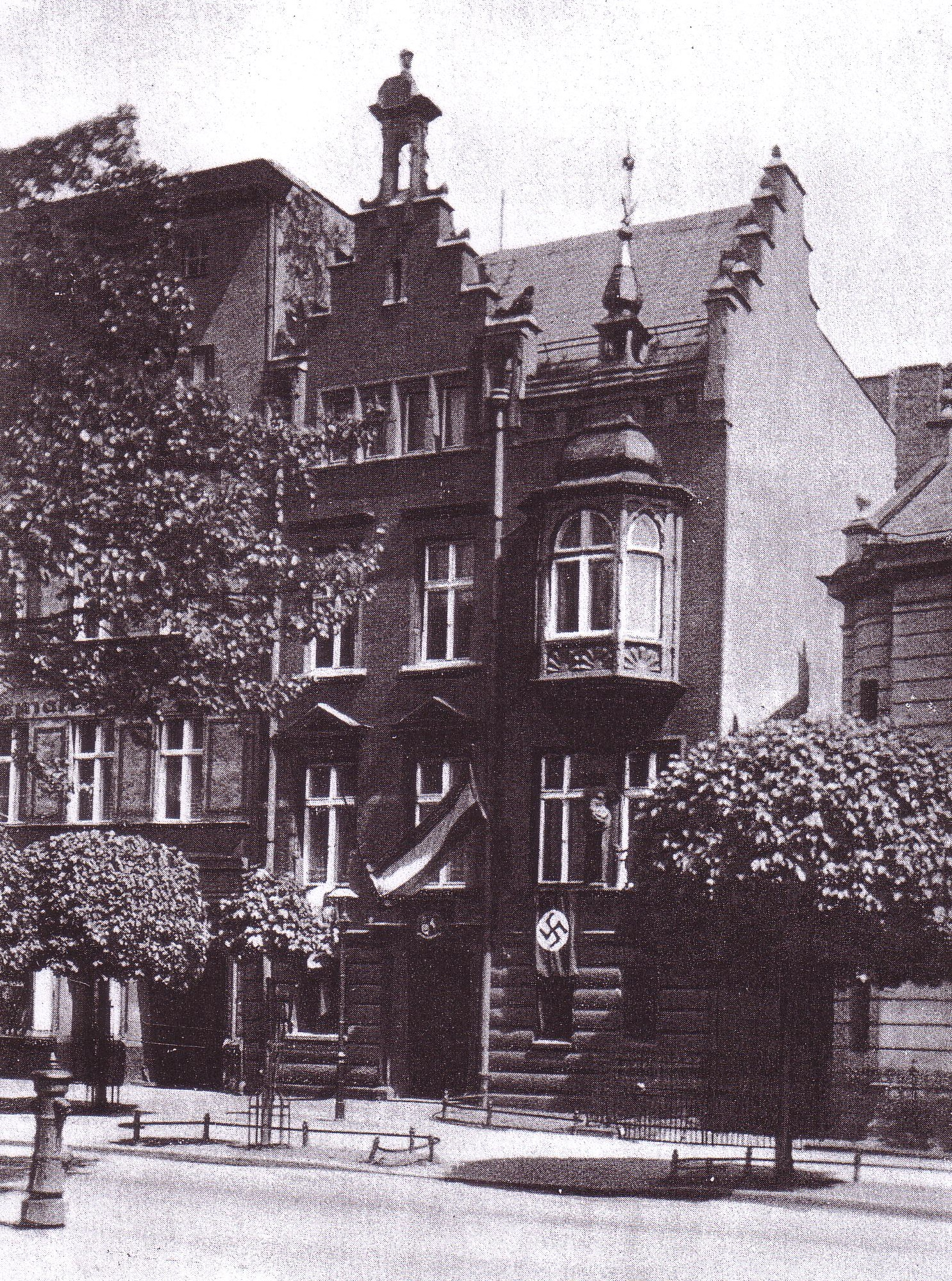 Corpshaus der Littuania in Königsberg